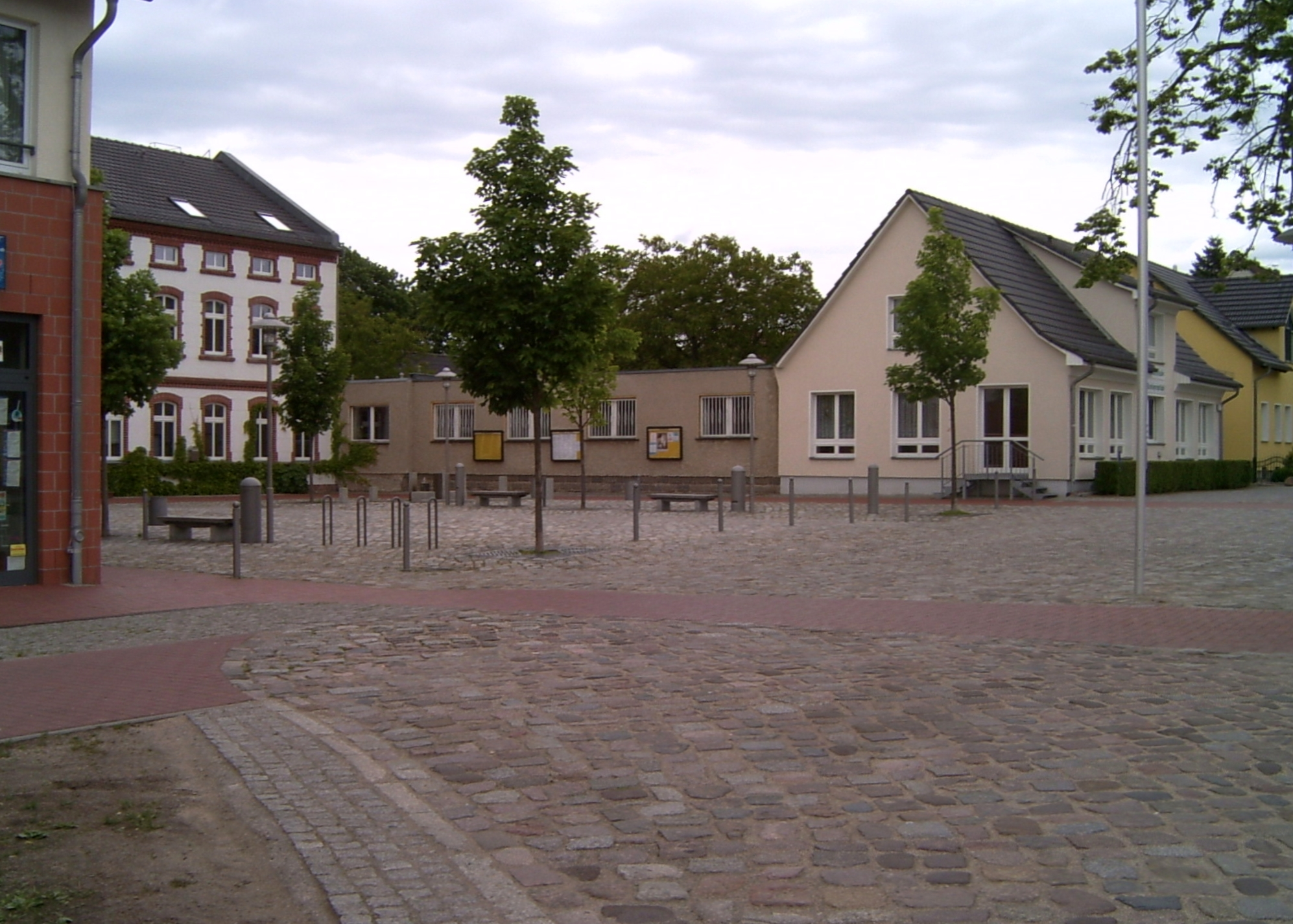 Ortszentrum, Blick auf das Rathaus